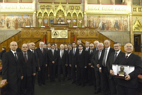 © MTI Fotó: Soós Lajos